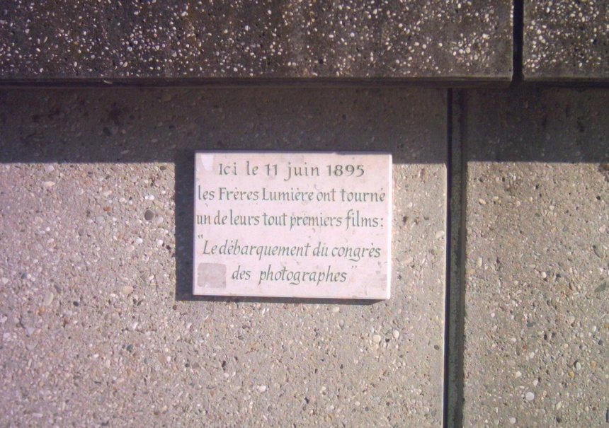 La plaque commémorant le film des Lumière sur le quai Pasteur, à Neuville-sur-Saône.